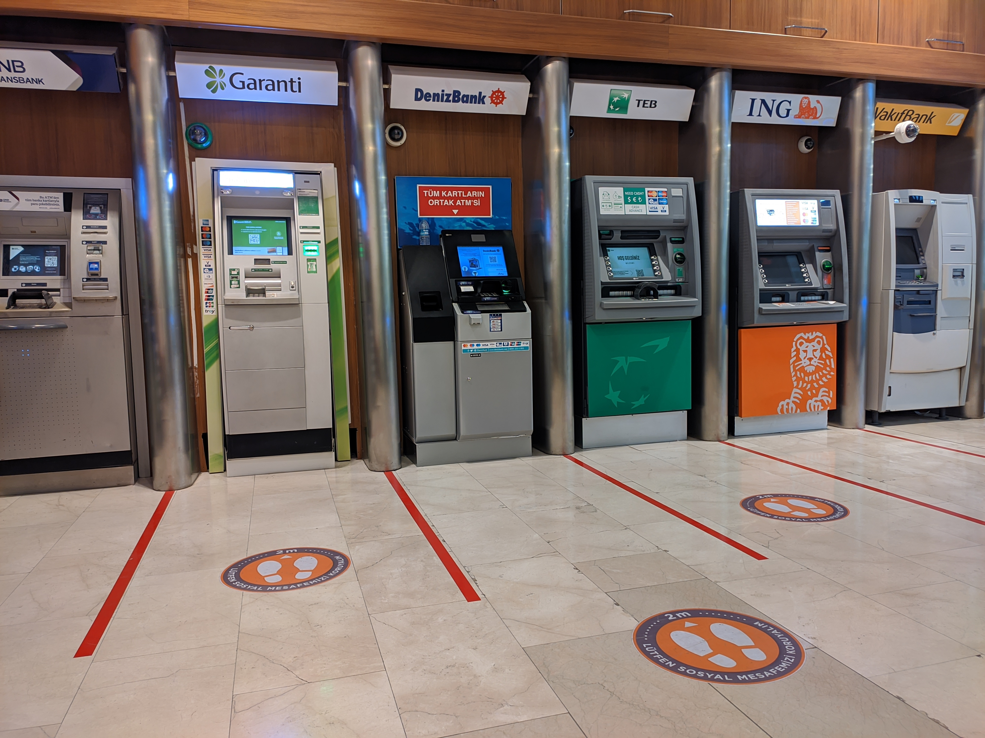 COVID-19'un risk teşkil ettiği süreçte Samsun'daki Piazza AVM'nin ATM kısmında yerlere yerleştirilen sosyal mesafe çıkartmaları.